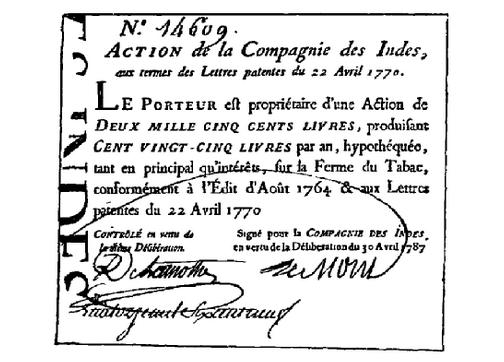 Action de 2500 livres tournois de la Compagnie des Indes datée du 30 avril 1787 signée Dumont et offrant 5 % d'intérêt l'an.